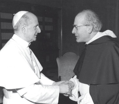 Padre Enrico con il Papa Paolo VI°